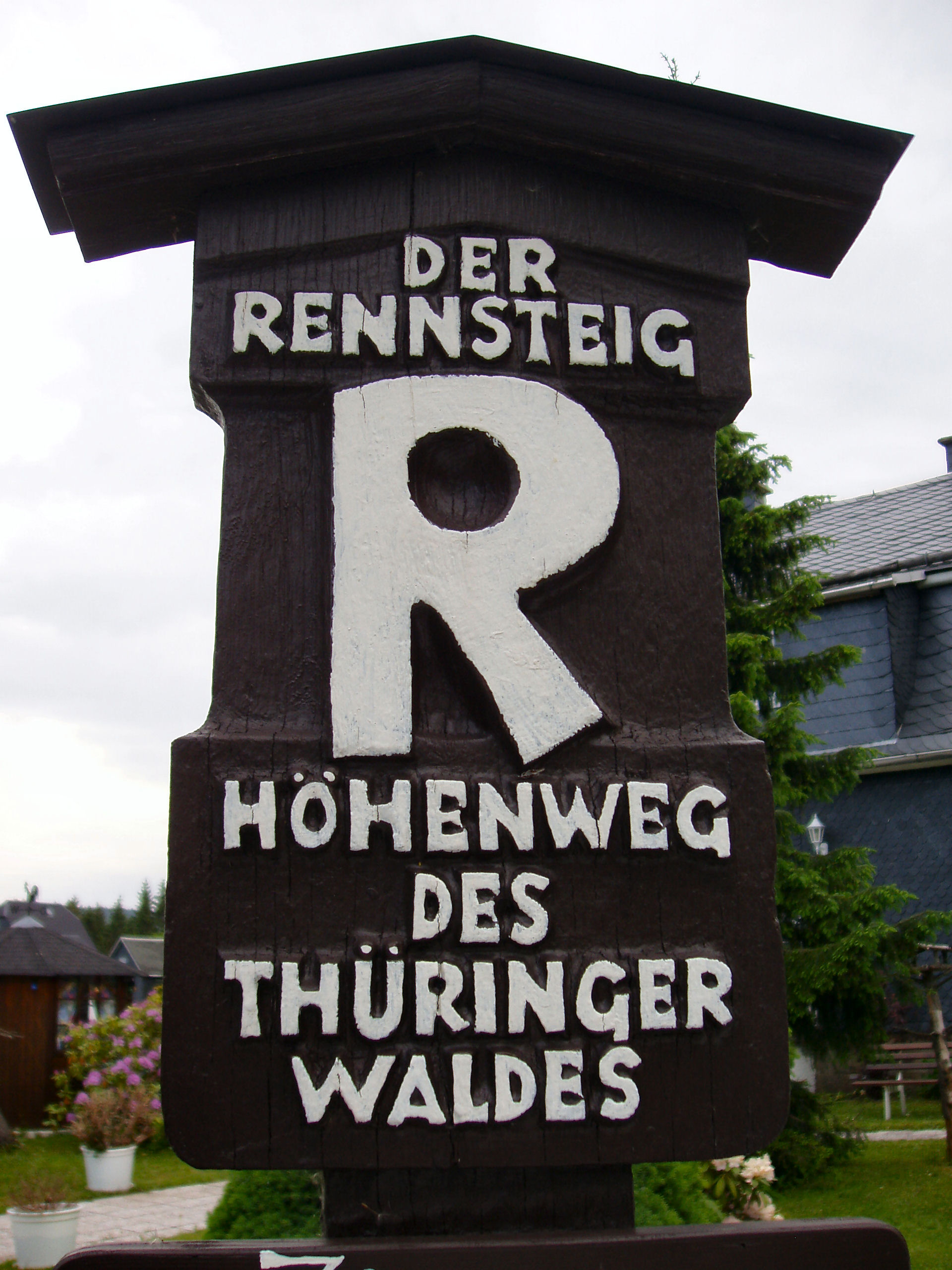 Rennsteigschild